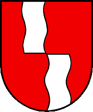 Wappen von Leuggelbach Kanton Glarus Schweiz